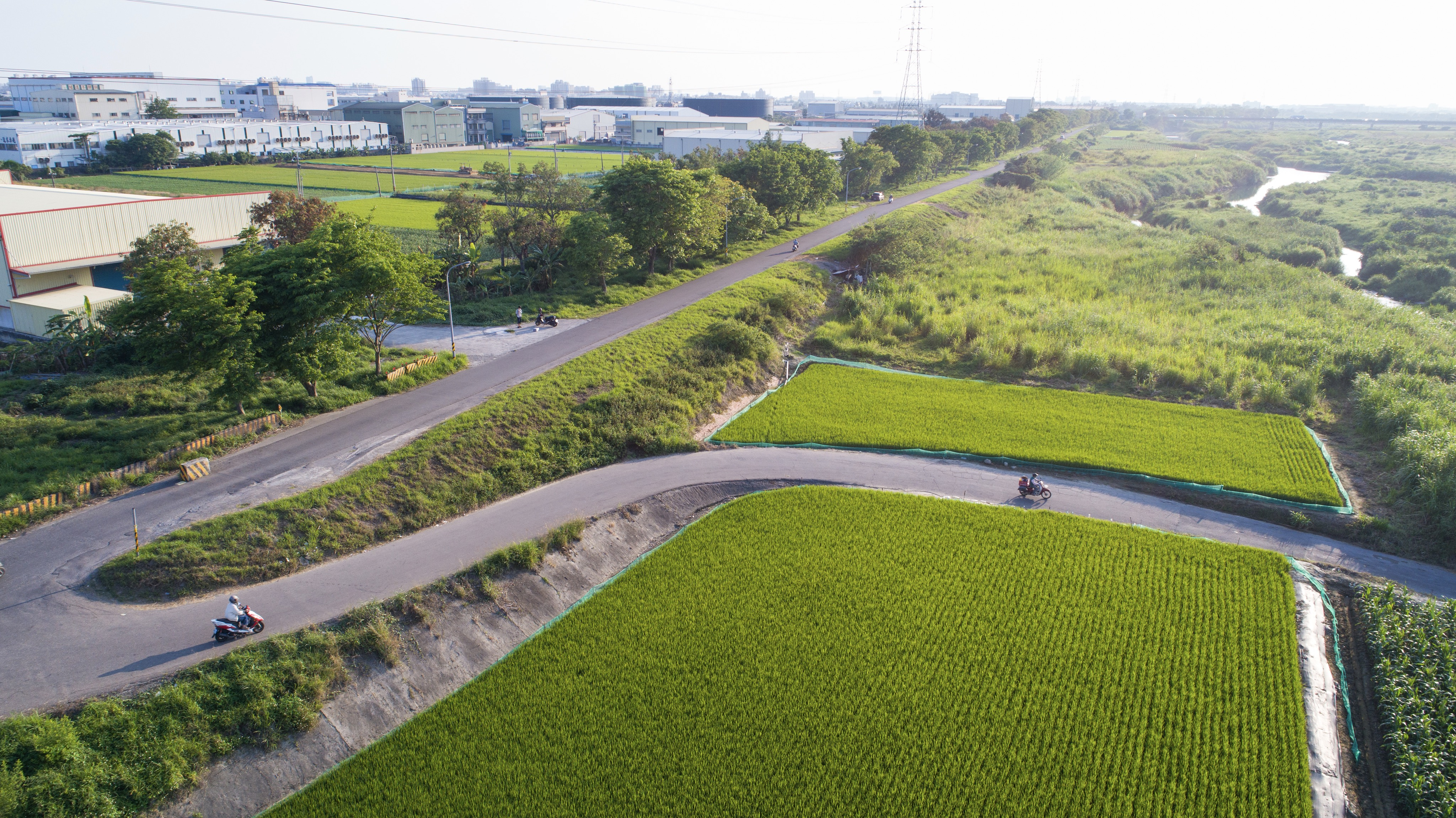 中文（台灣）: 新市區和平路便橋附近2